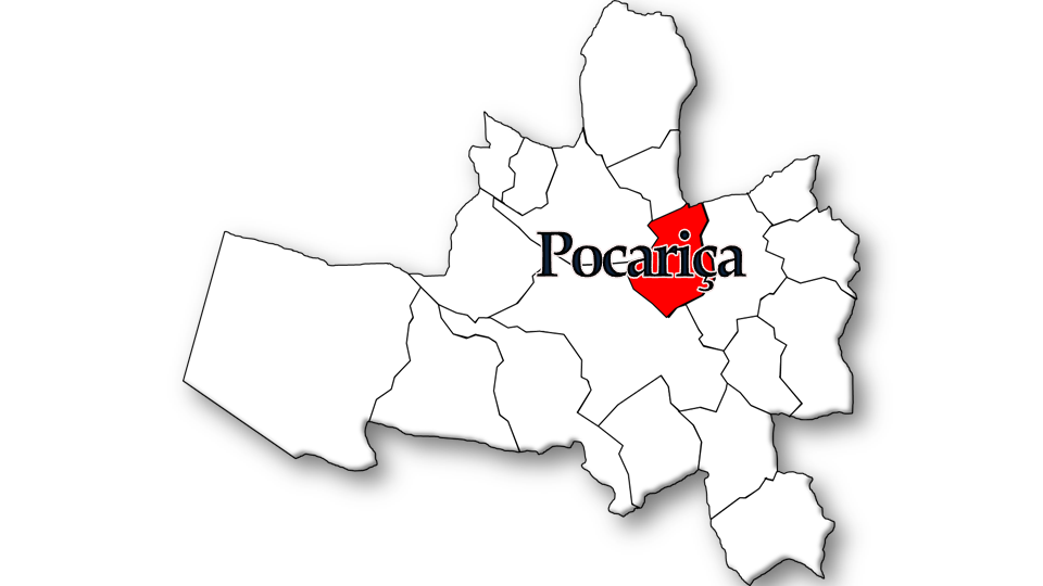 População